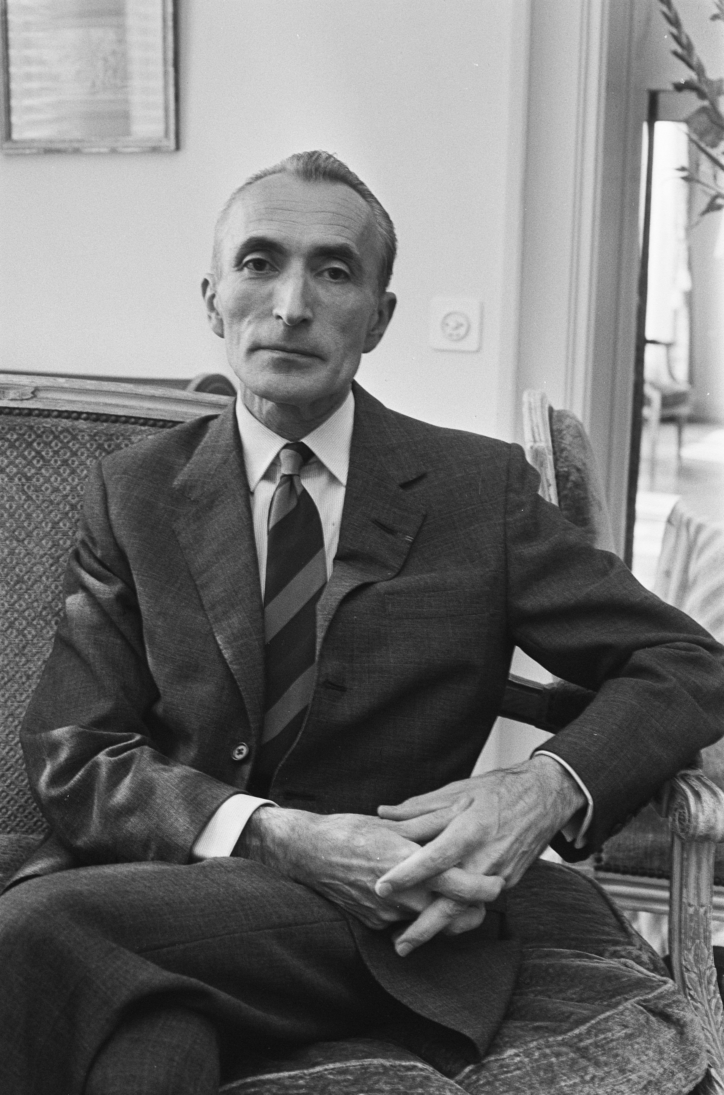 Collectie / Archief : Fotocollectie Anefo Reportage / Serie : [ onbekend ] Beschrijving : Franse ambassadeur na gijzeling weer thuis; Graaf Jacques Senard in zijn woning (kop) Datum : 18 september 1974 Trefwoorden : ambassadeurs, gijzelingen Fotograaf : Verhoeff, Bert / Anefo Auteursrechthebbende : Nationaal Archief Materiaalsoort : Negatief (zwart/wit) Nummer archiefinventaris : bekijk toegang 2.24.01.05 Bestanddeelnummer : 927-4591